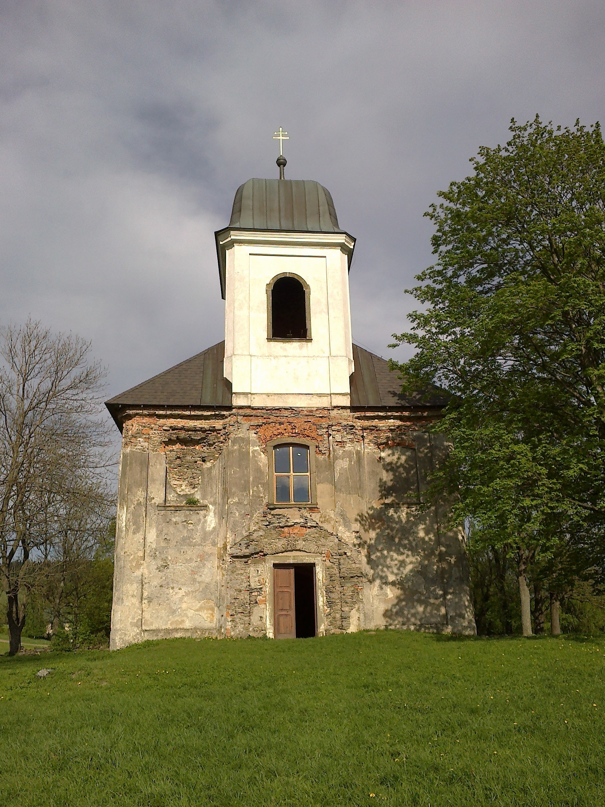 Kostel sv. Matouše Jedlová